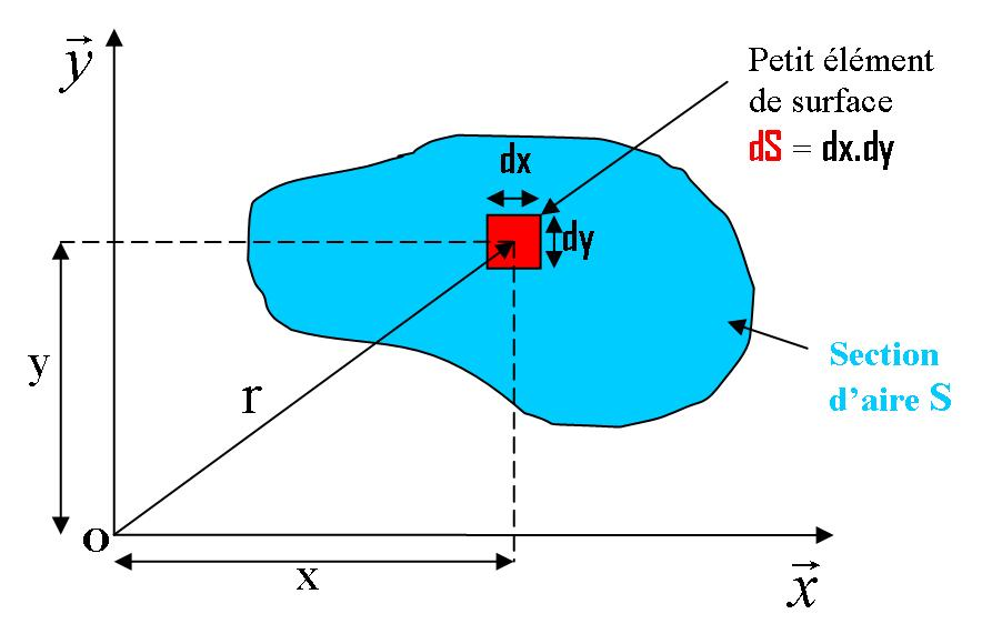 Schéma pour la définition du moment quadratique. Auteur: Xavier Lory.